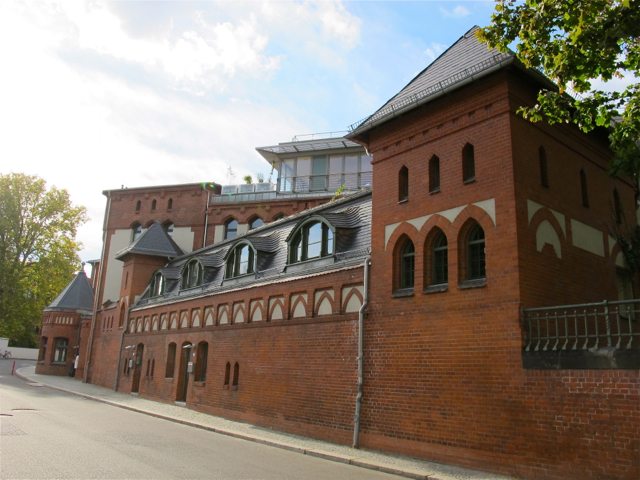 Ehemalige Schultheiss-Brauerei Abteilung II in der Methfesselstraße in Berlin-Kreuzberg. Die Brauerei war als Schultheiss Abteilung II im Betrieb 1891-1994.